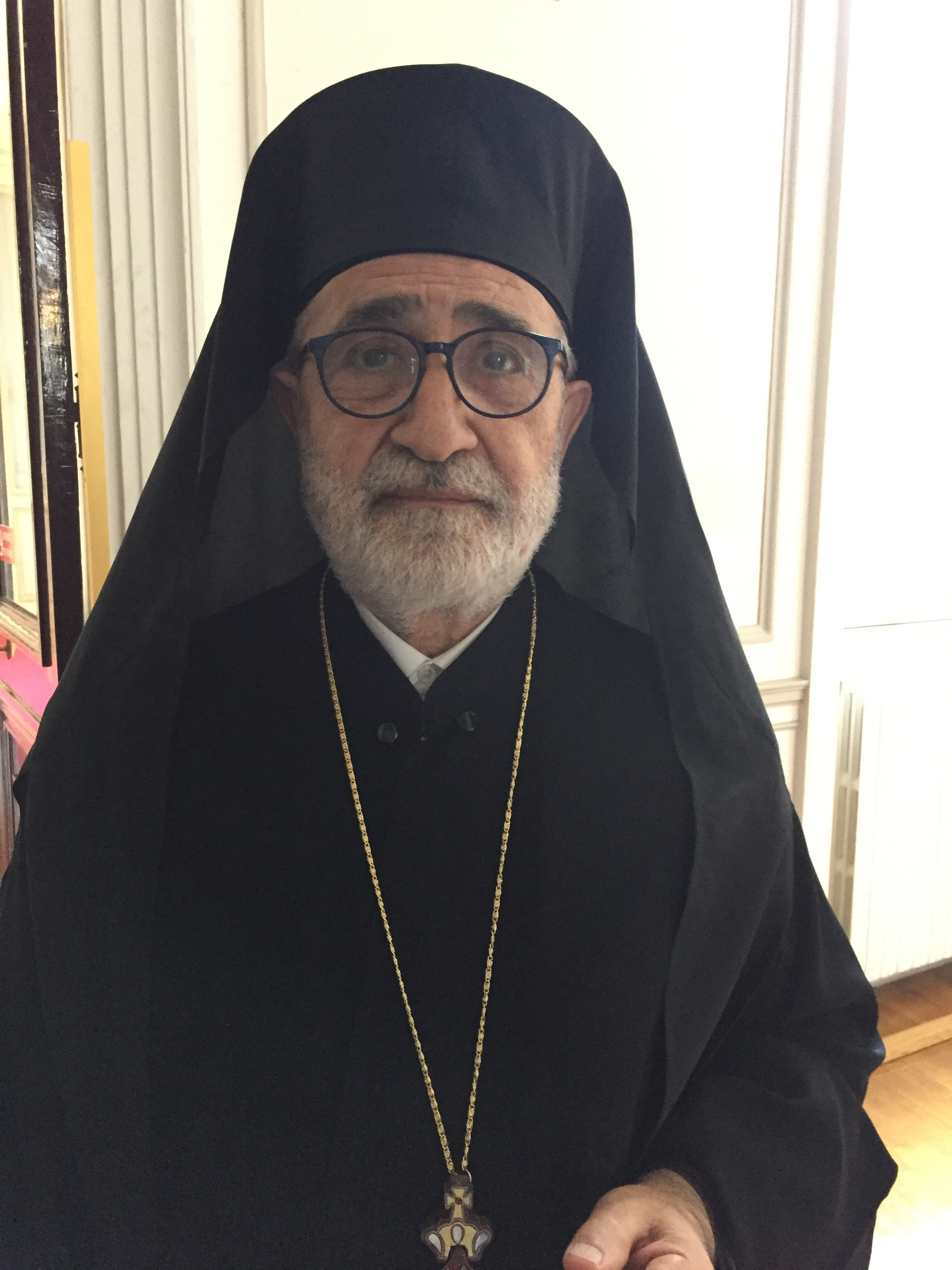 Archevêque, Vicaire Patriarcal de Damas des grecs-melkites catholiques.